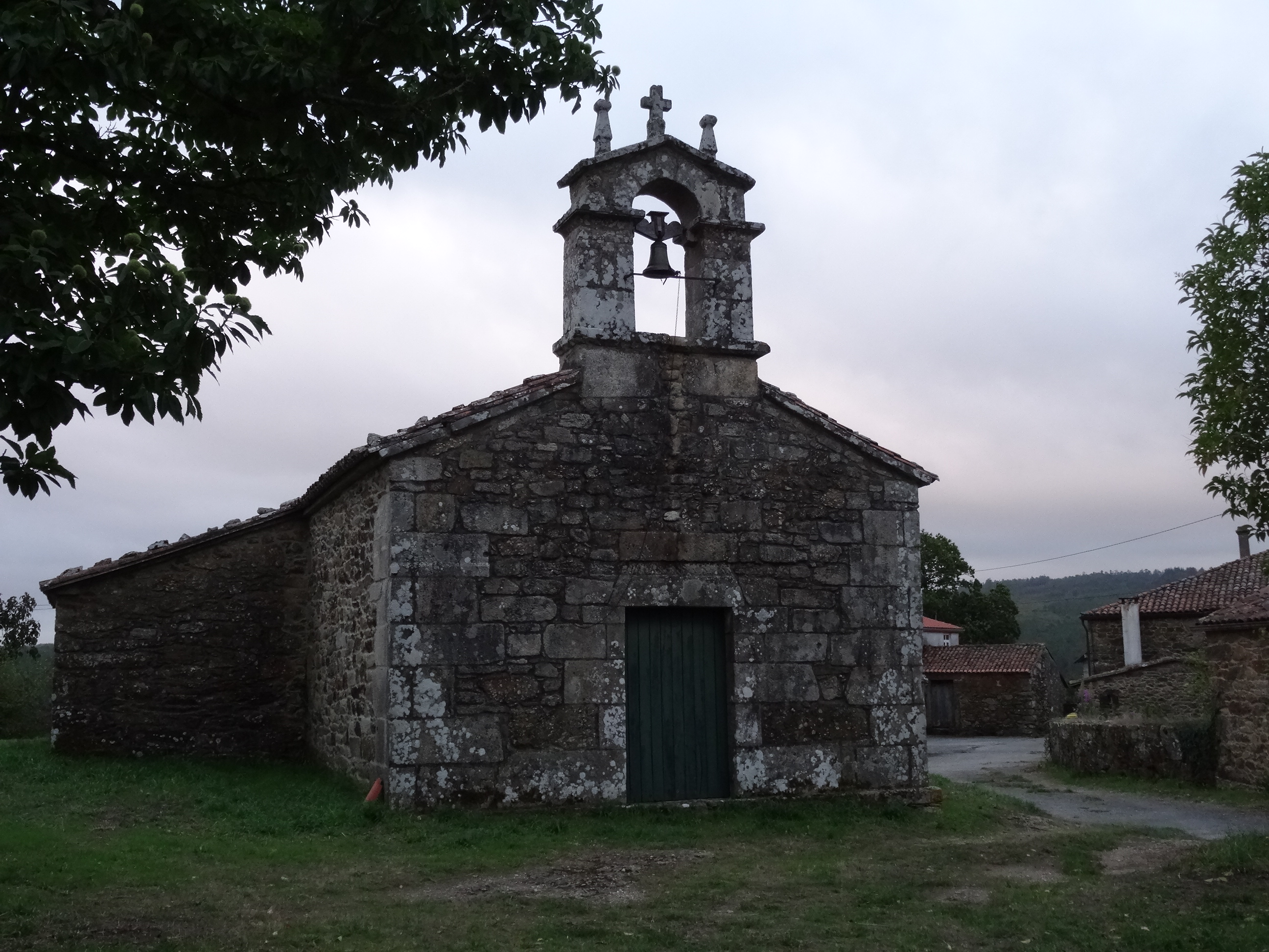 Igrexa da parroquia de Mourazos no concello de Santiso, provincia da Coruña